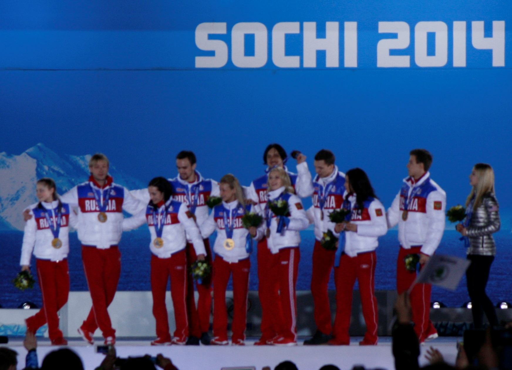 Победители в командных соревнованиях по фигурному катанию на зимних Олимпийских играх в Сочи - сборная России